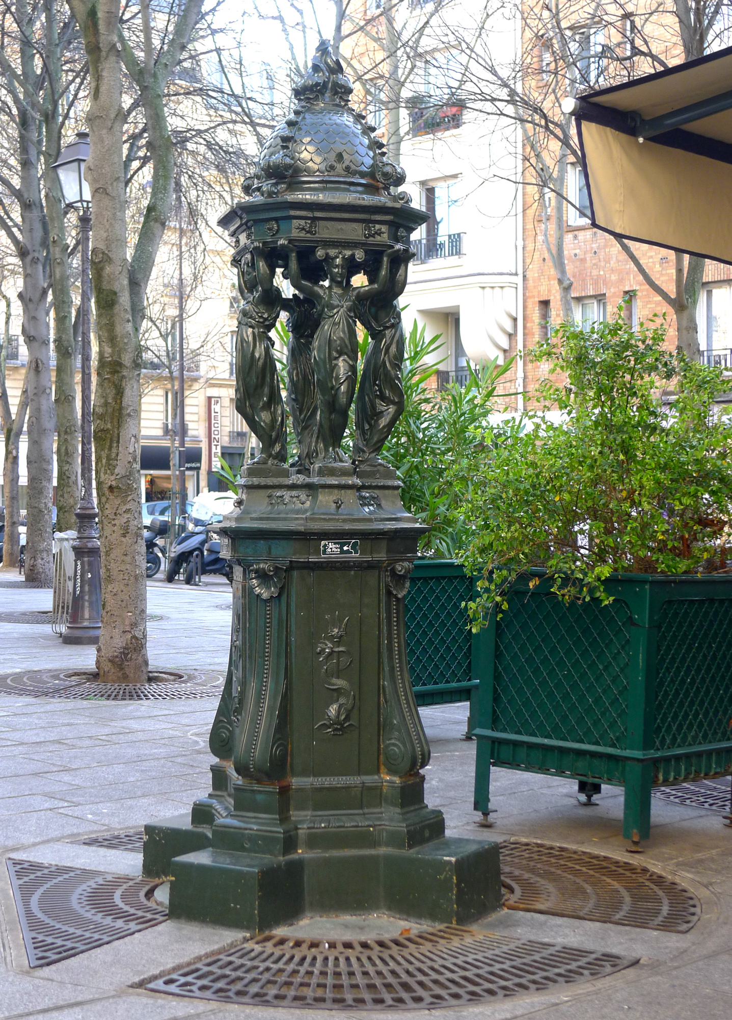 Place Nathalie-Lémel (fontaine Wallace) - Paris III